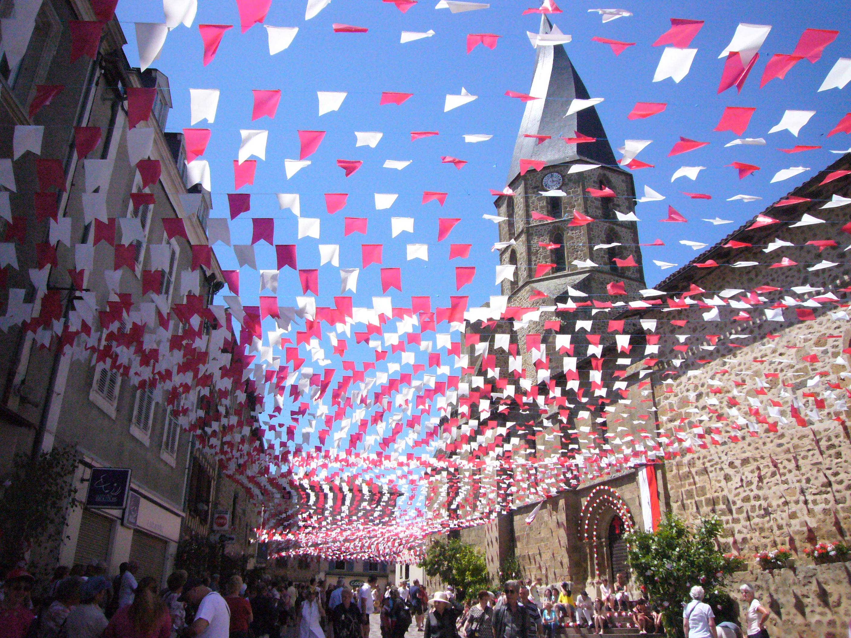 Décorations dans Rochechouart (Haute-Vienne, France) pour les traditionnelles Ostensions septennales